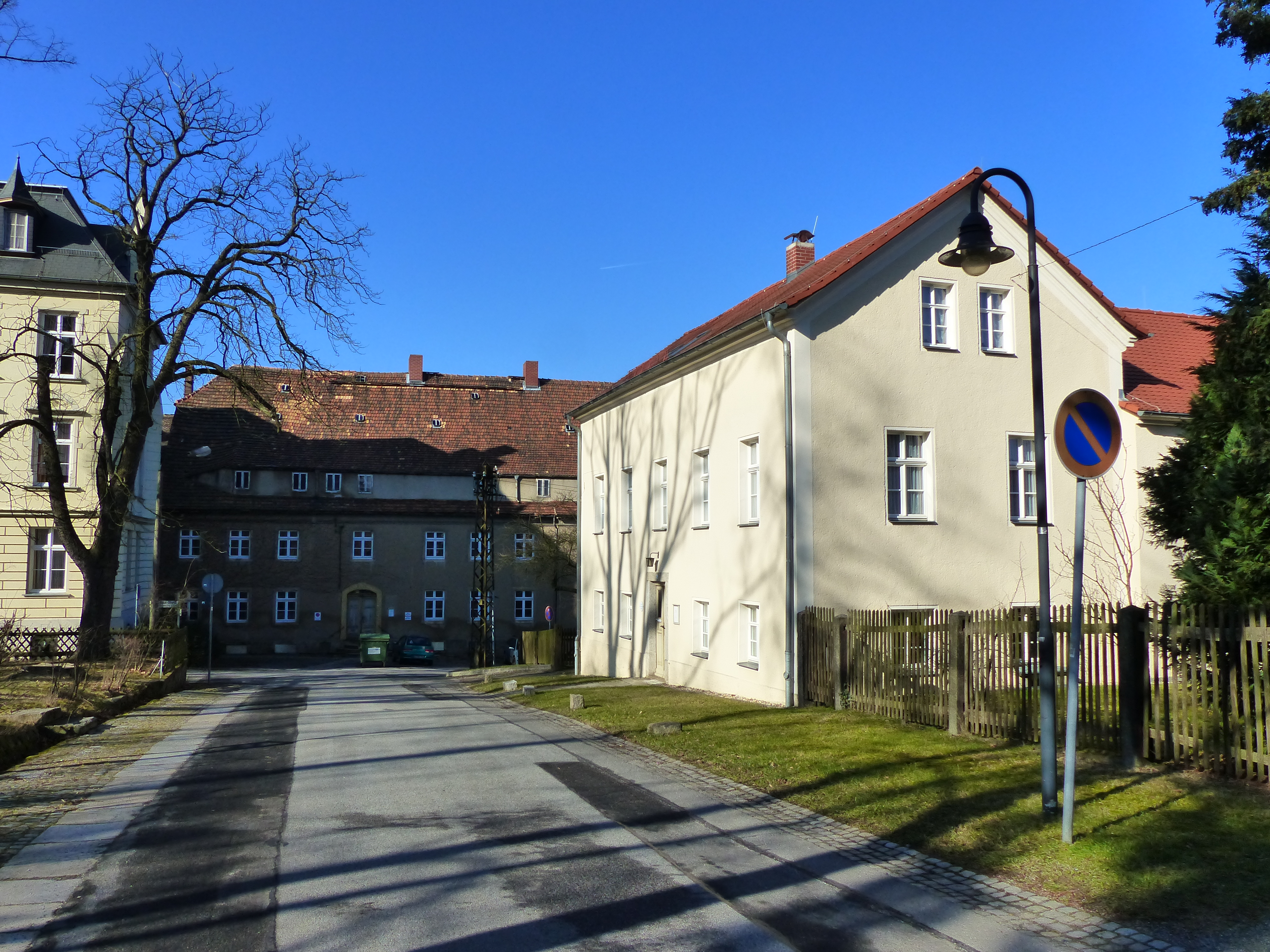 Denkmalgeschützte Gebäude, Matthäus-Lange-Straße 1 und Zinzendorfplatz 5, Kleinwelka